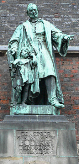 Statue von Hermann Wilhelm Bödeker an der Marktkirche Hannover